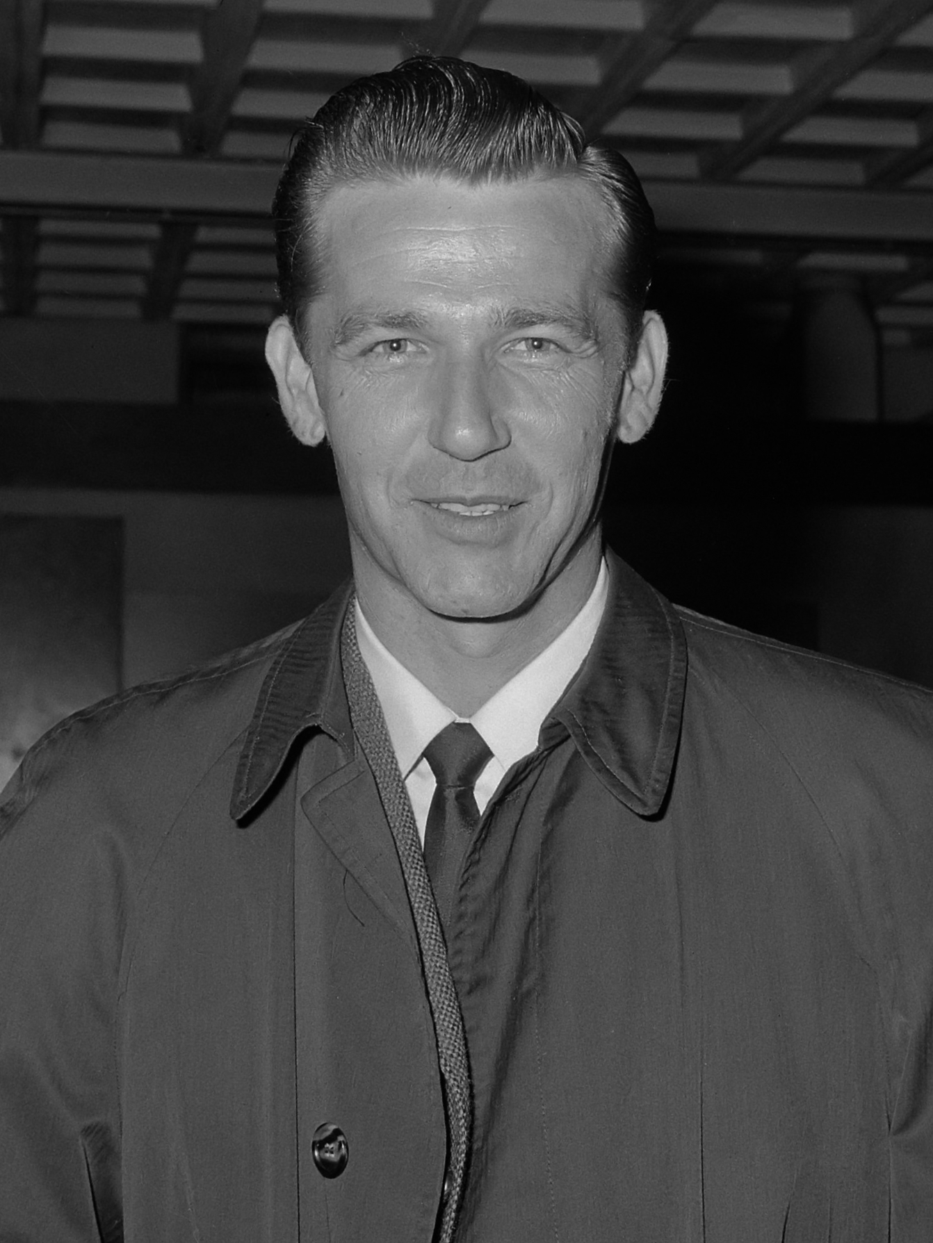 Aankomst Floyd Cramer (met The Anita Kerr Singers op Schiphol, Floyd Cramer (kop) 4 mei 1965